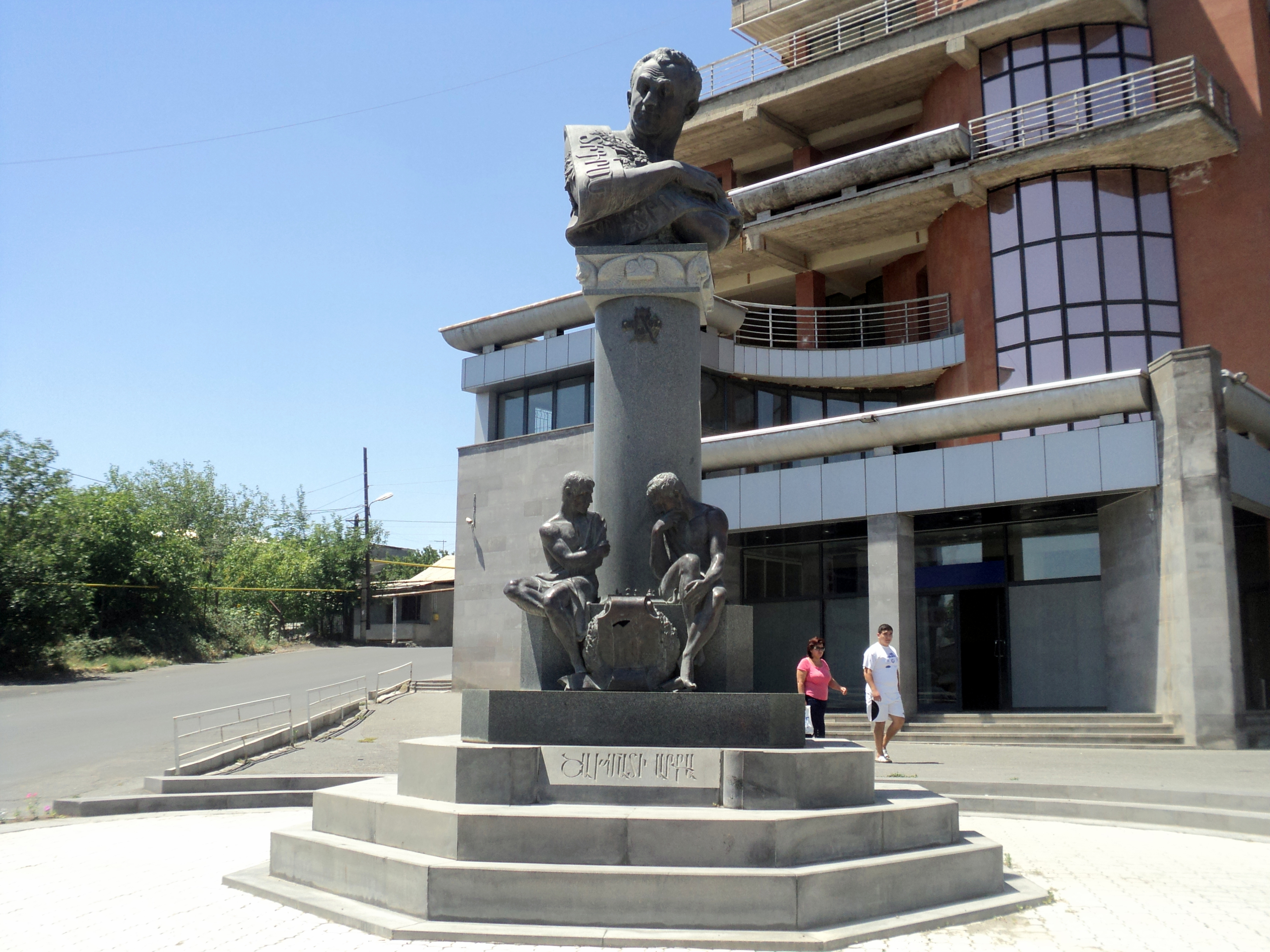 Տիգրան Պետրոսյան Հեղինակն ու ճարտարապետ` Նորայր Կարգանյան 2006 թ. Գտնվում է Դավթաշեն համայնքում 4/1